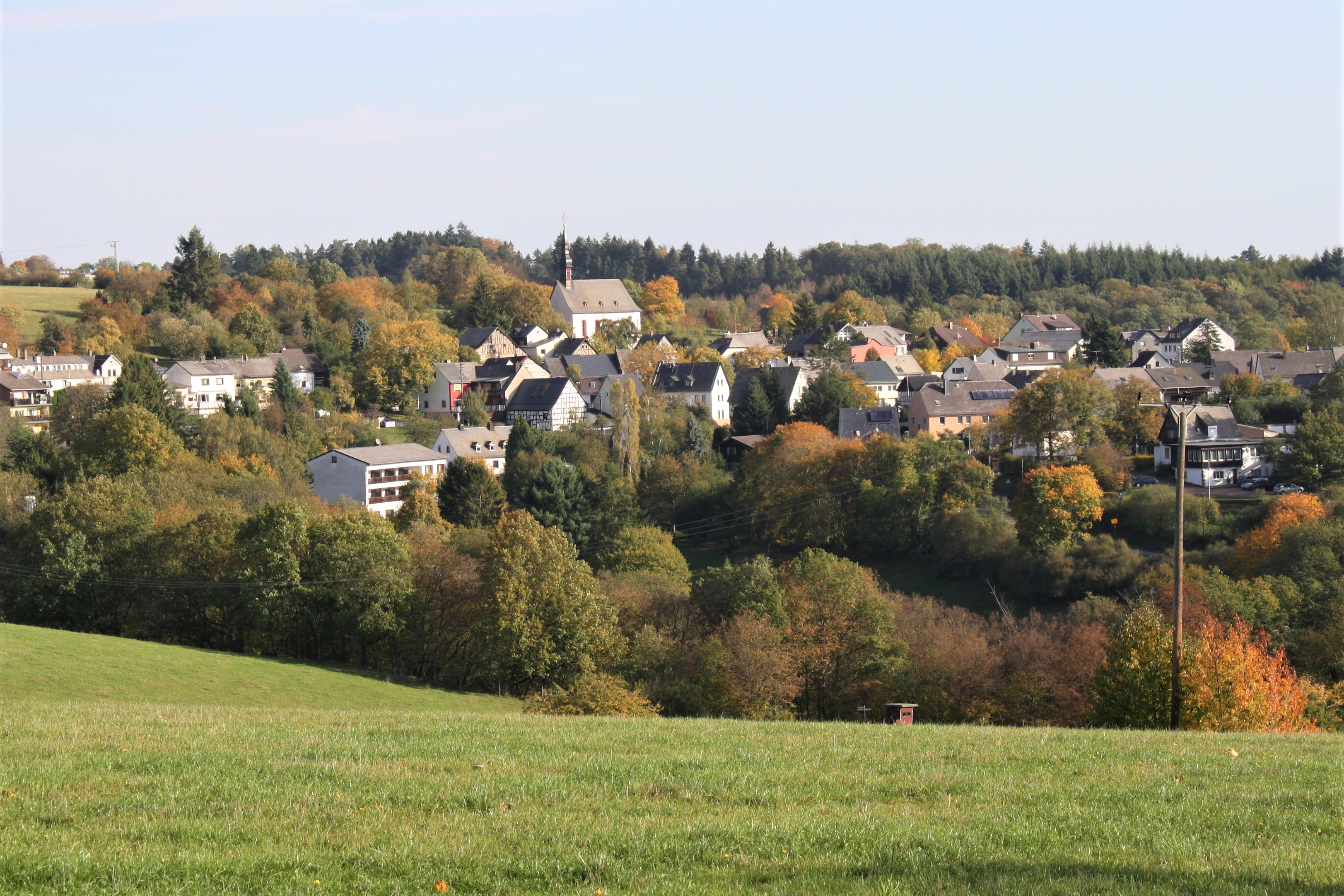 Espenschied ein Stadtteil von Lorch Rheingau